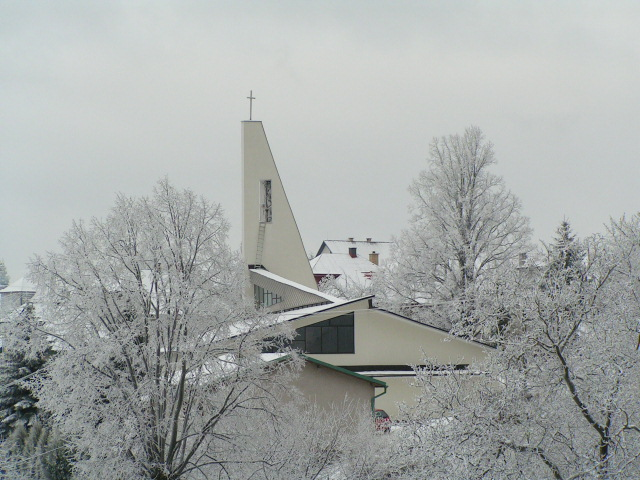 Autor: Miroslav Ďurian